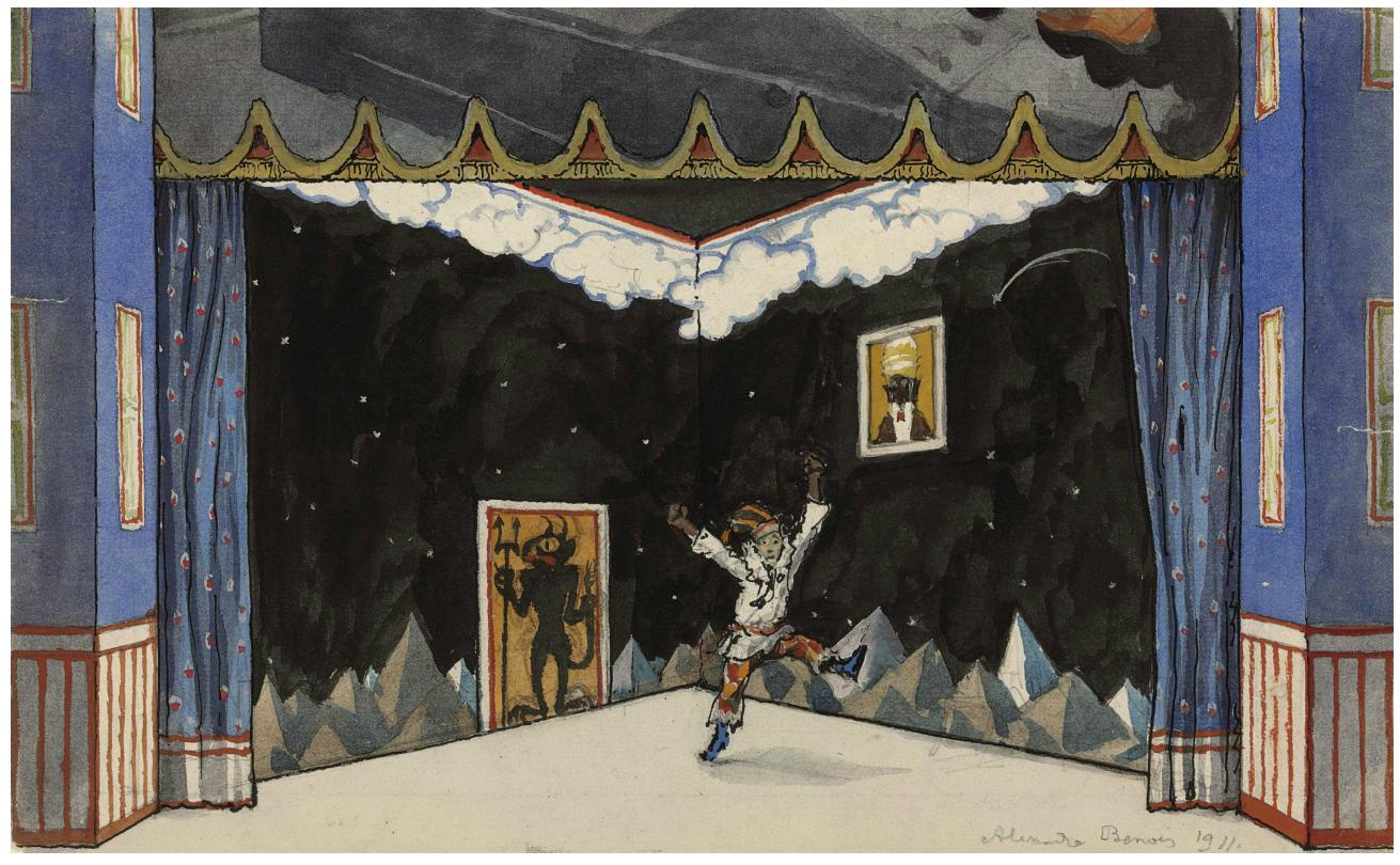 Ballet "Petrushka" by Benois